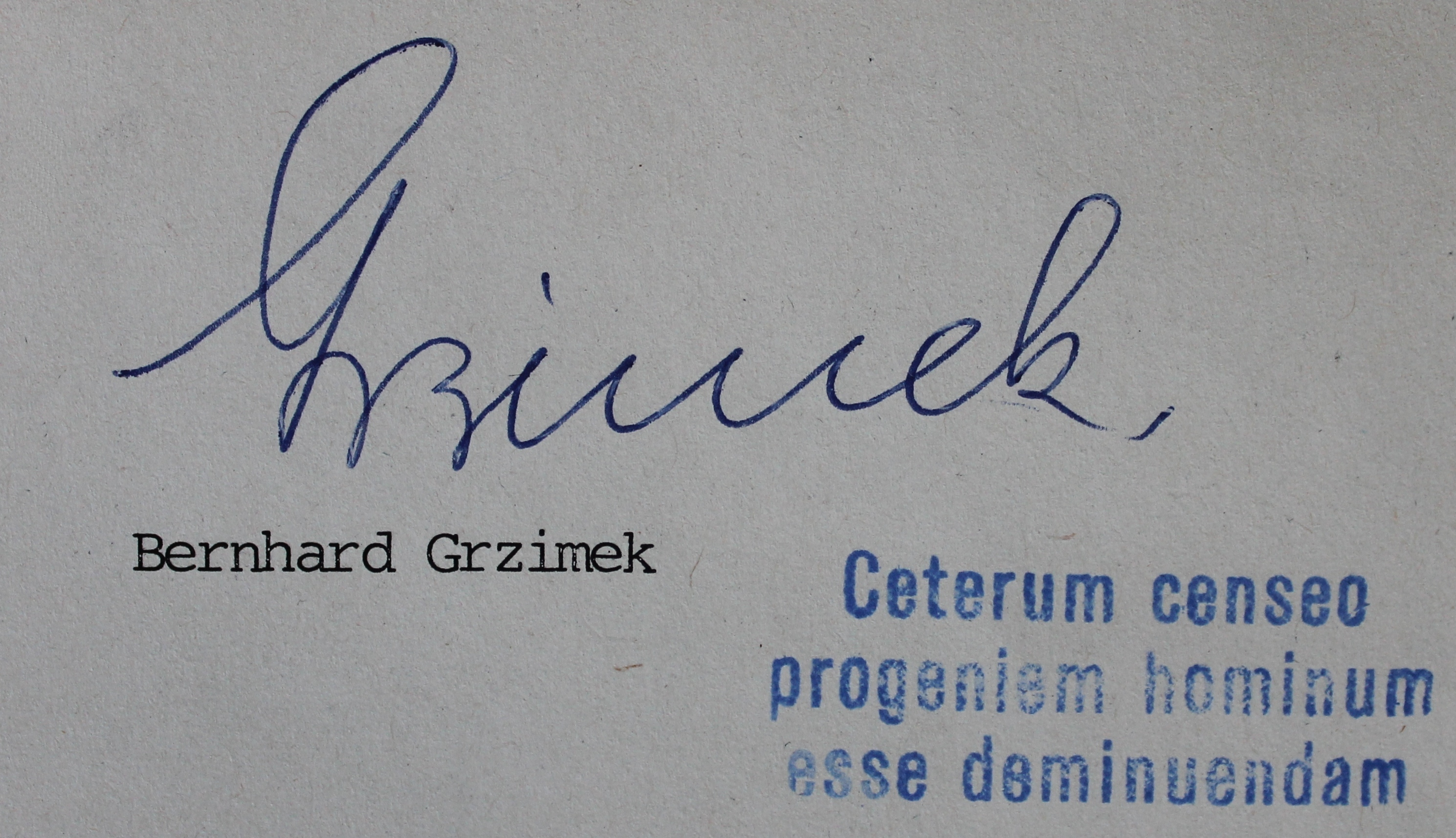 Signatur und Stempel aus einem persönlichen Brief vom 11. März 1986, ein Jahr vor seinem Tod (Zoologische Gesellschaft Frankfurt)